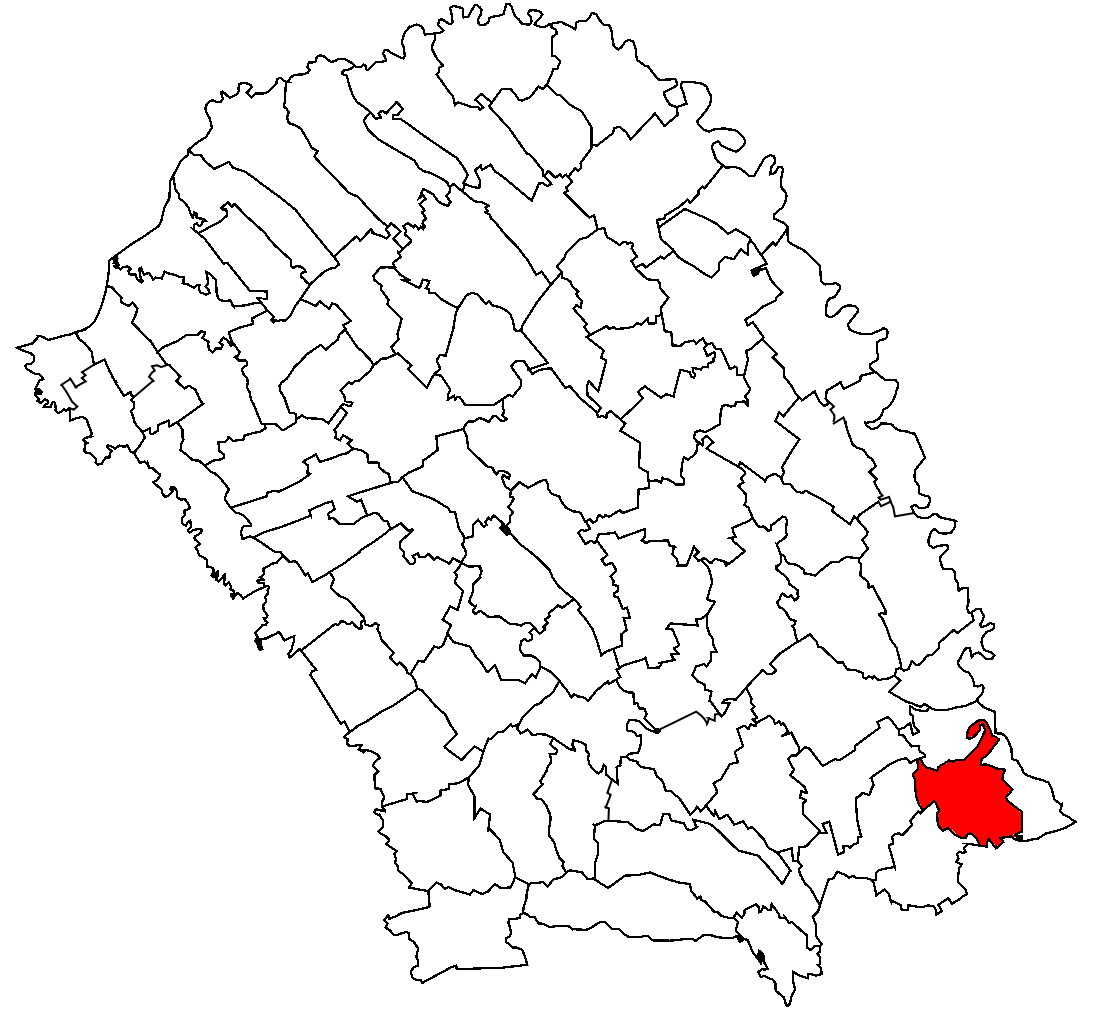 Categorie:Hărţi ale judeţului Botoşani